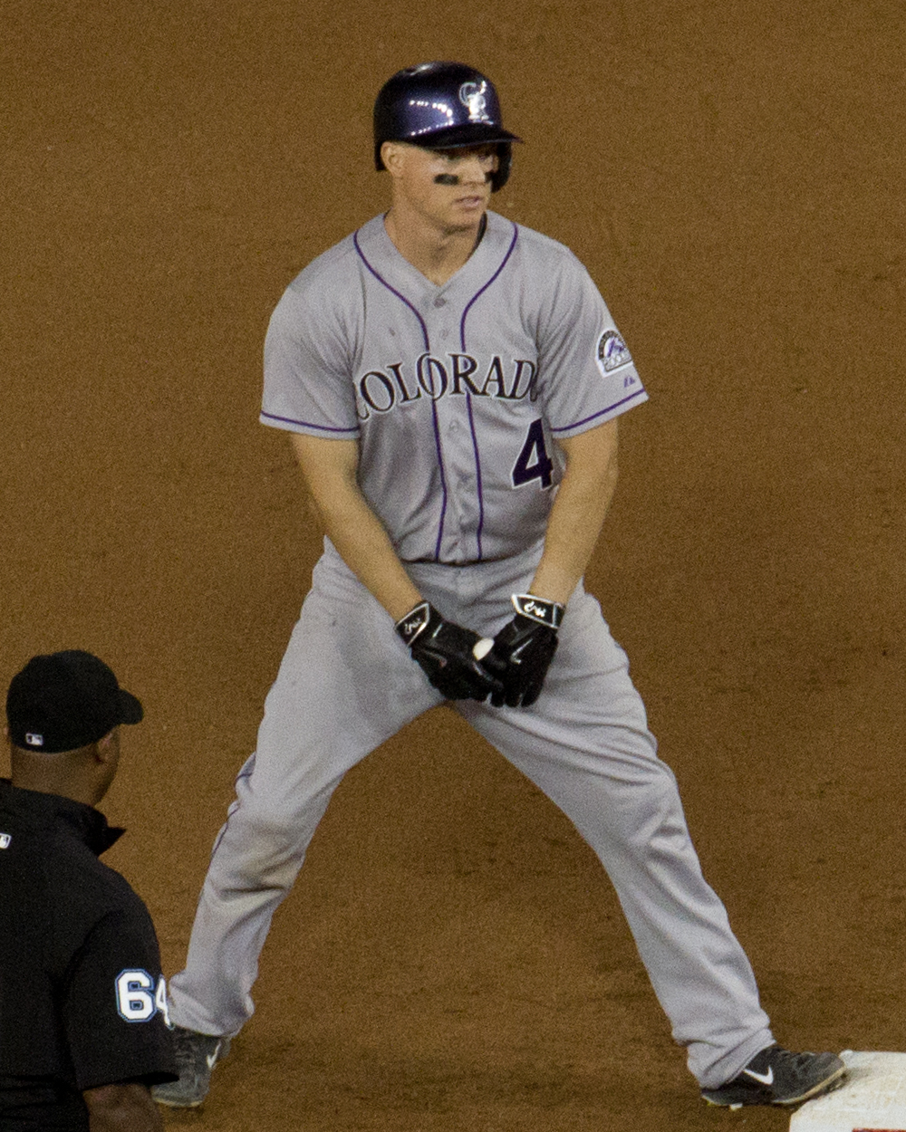 Nick Hundley